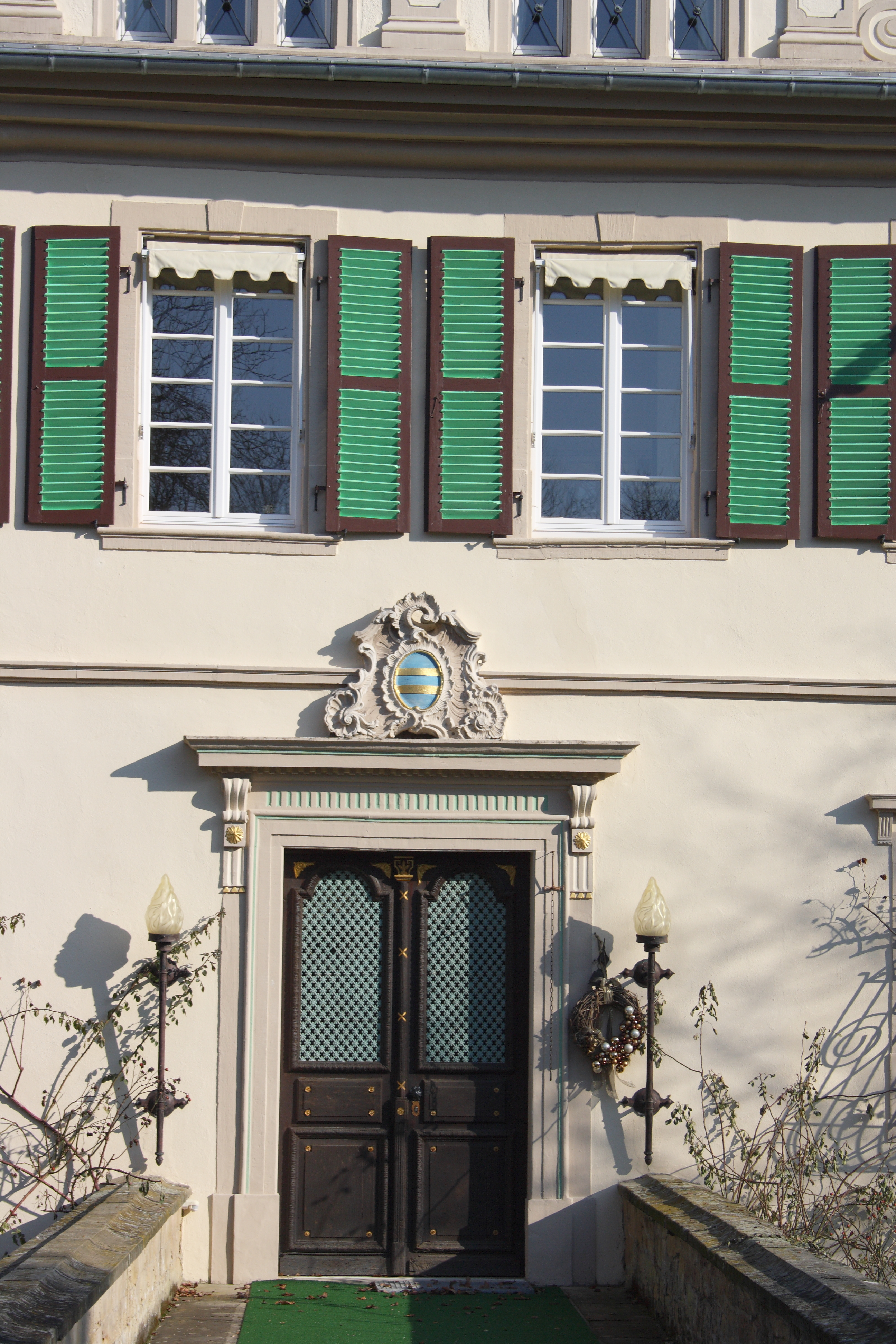 Schloss in Michelfeld, über dem Portal das Wappen der von Gemmingen